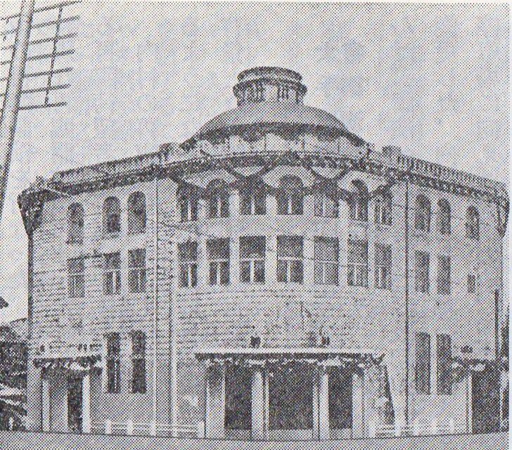 大手町内務省前にあった大日本私立衛生会の講堂